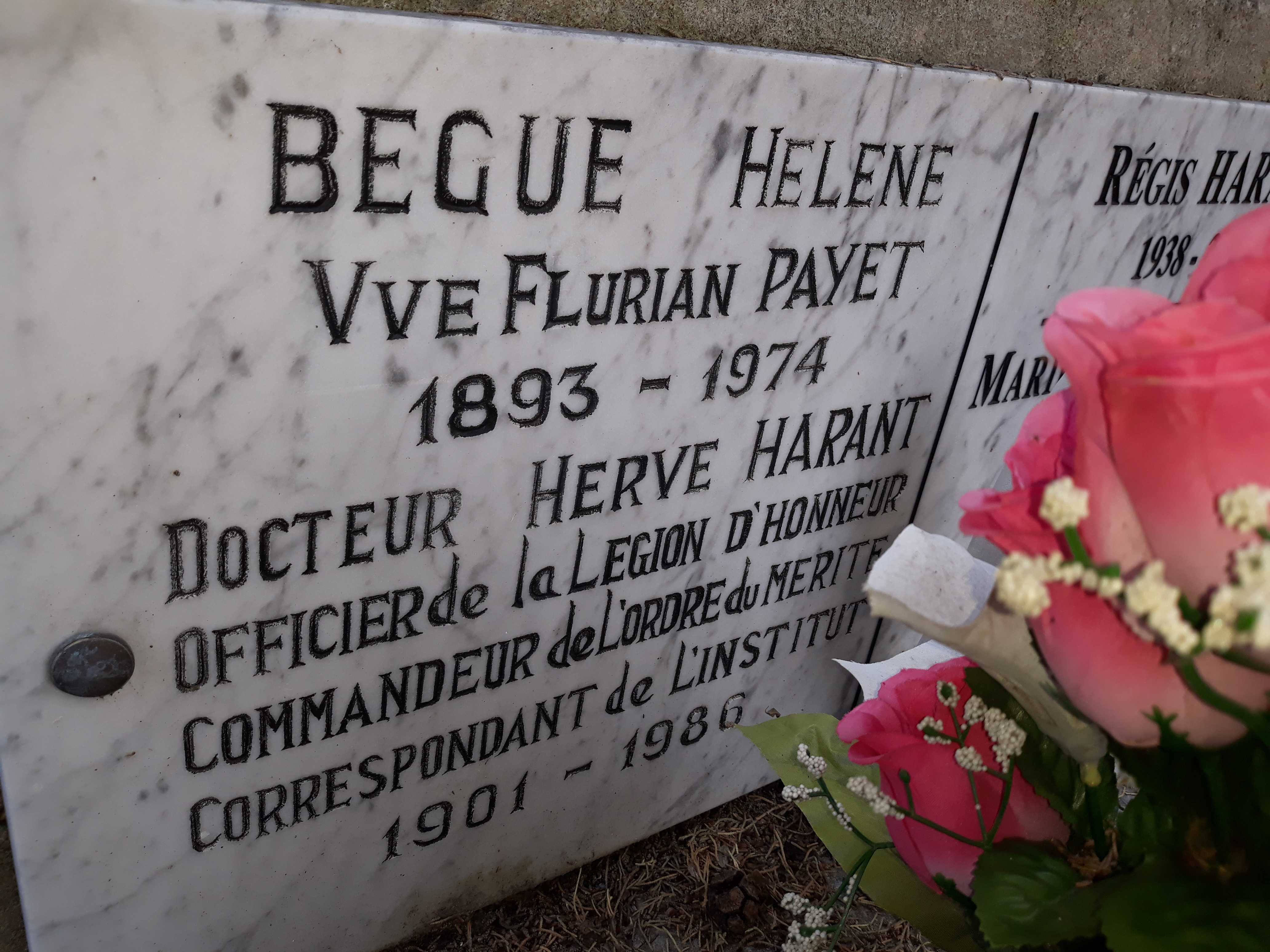 Das Grab des französischen Parasitologen und Botankiers Herve Harant auf dem alten Friedhof in Béziers (Hérault).